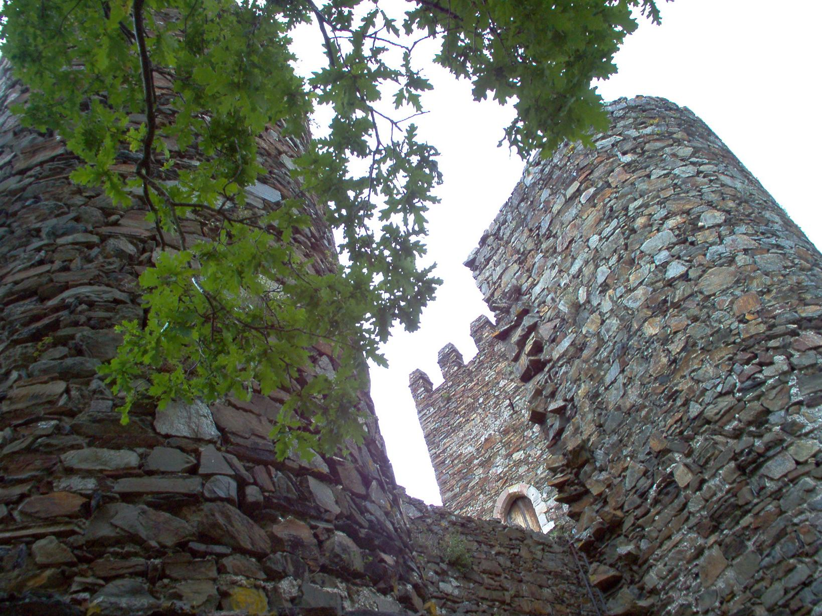 Castelo em xisto, 2007, Lousã This file was uploaded for Wiki Loves Monuments in Portugal with the unique identifier 70740.